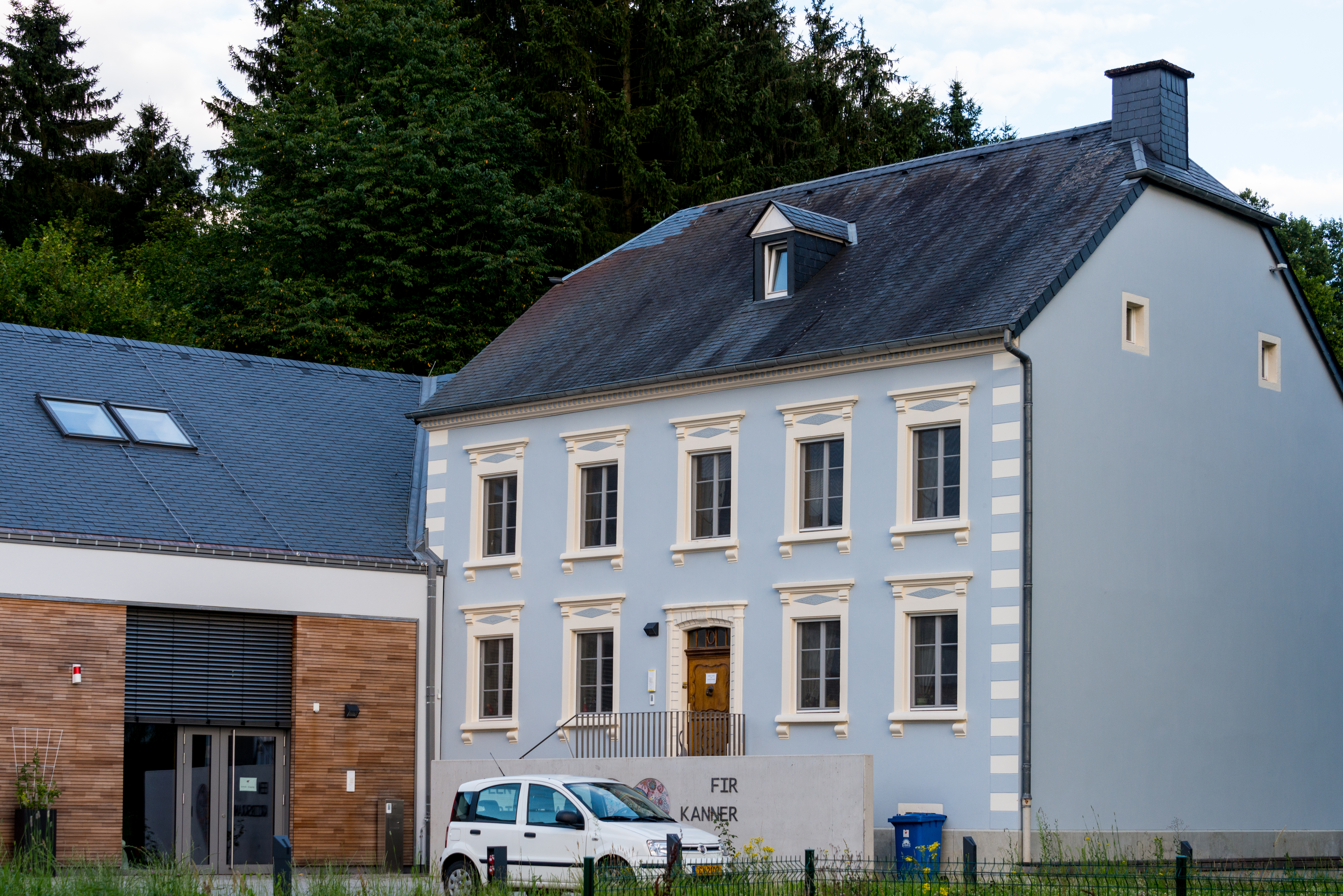 De Siège vun der Asbl «Een Häerz fir kriibskrank Kanner» an der Rue de Helpert zu Béiwen.